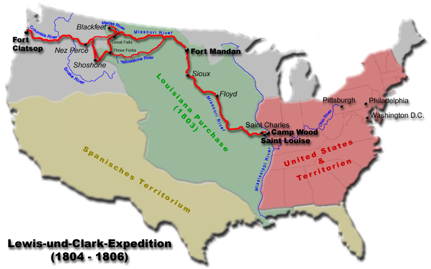 Karte - Wegstrecke der Lewis-und-Clark-Expedition (1804 - 1806). Beschreibung der Wegpunkte: Winterquartier 1803/1804 Camp Wood Grab von Sergeant Floyd Konfontation mit den Sioux Winterquartier 1804/1805 Fort Mandan Treffen mit den Shoshone Treffen mit den Nez Perce Winterquartier 1805/1806 Fort Clatsop Variationen 1806: Clark am Yellowstone River Lewis am Marias River Auseinandersetzung mit den Blackfeet